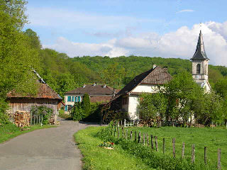 Courcelles, Territoire de Belfort, entrée du village. Photo prise en mai 2004 par LP90 Licence GFDL LP90 mai 2004